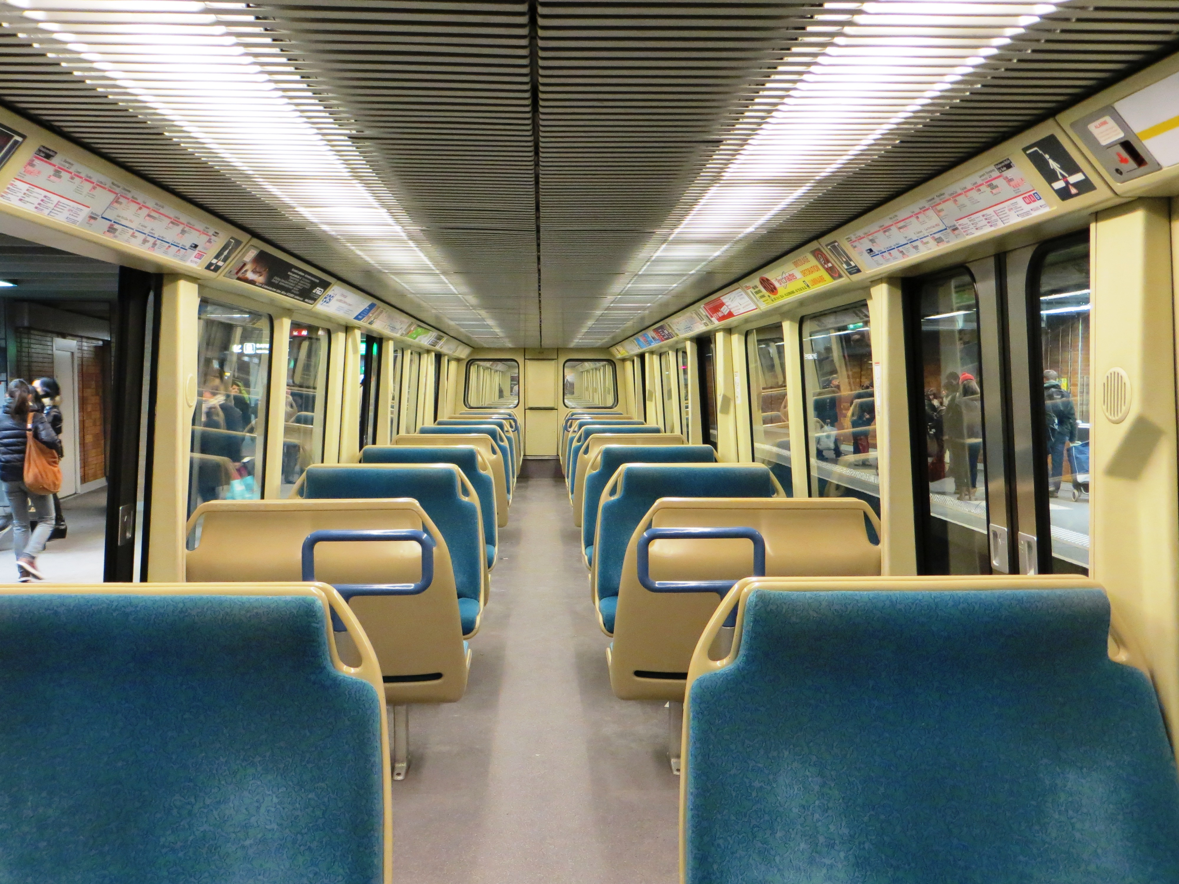 Rame non rénové avec l'ancienne disposition des sièges